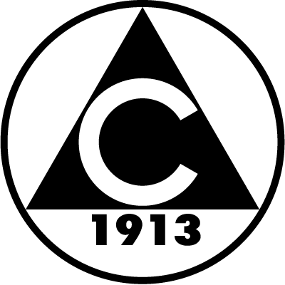 Logo